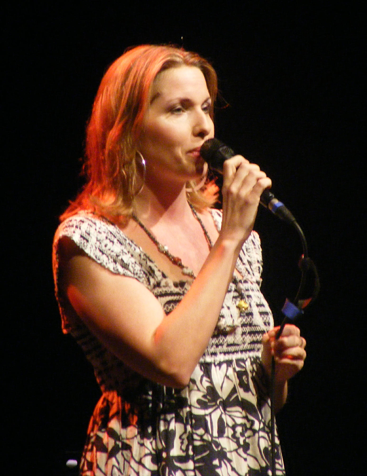 Victoria Tolstoy (Jazzfestival St. Ingbert 2009)